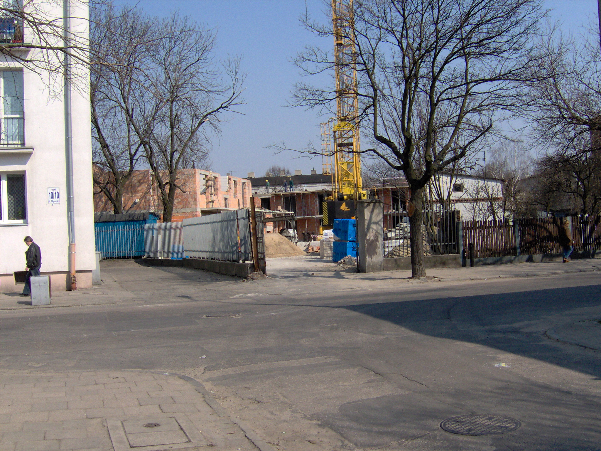 Budowa bloku mieszkalnego przy ul. Stodólnej 39/41 (na terenie dawnego komisariatu Włocławek-Śródmieście)